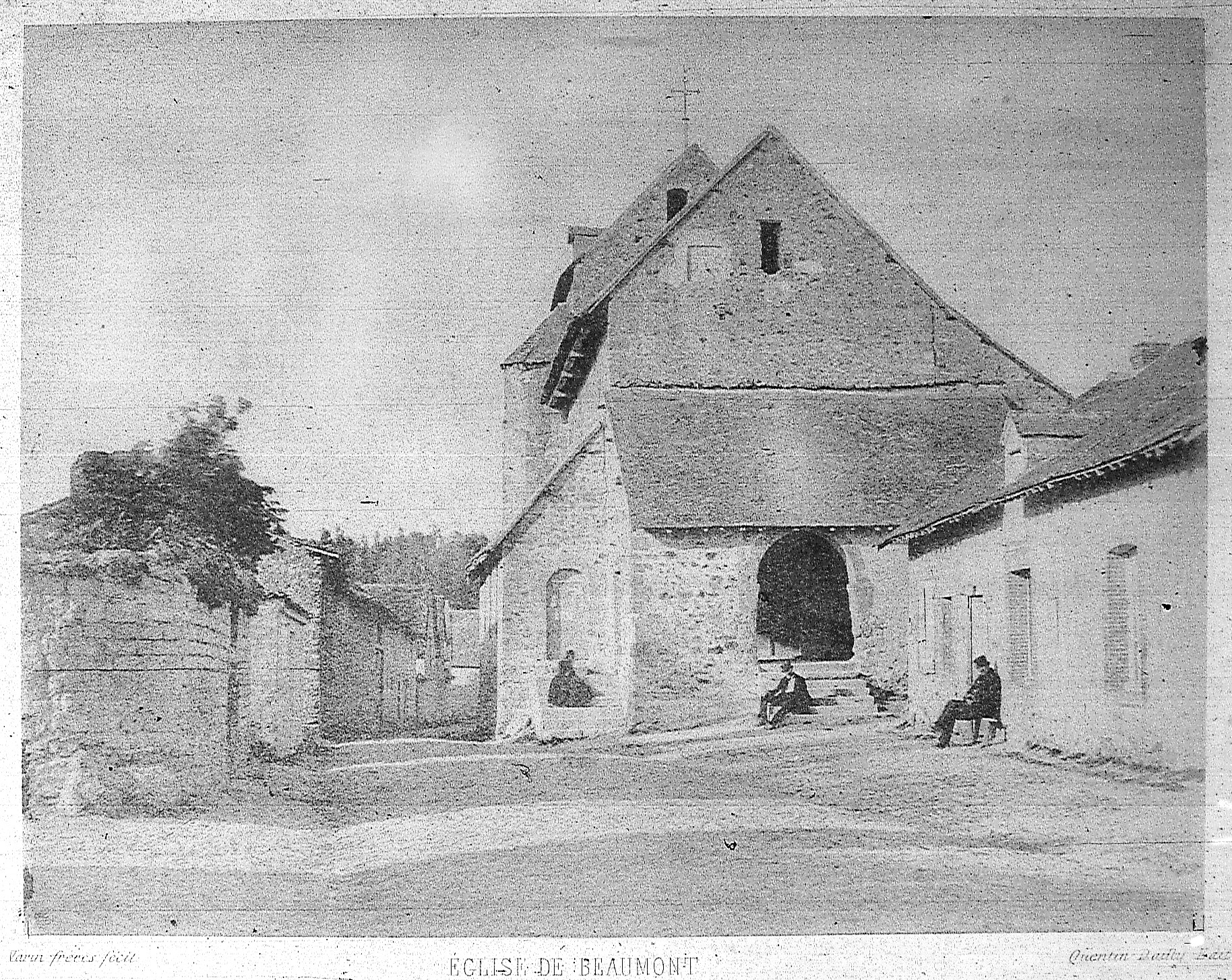 une vue de beaumont sur vesle.